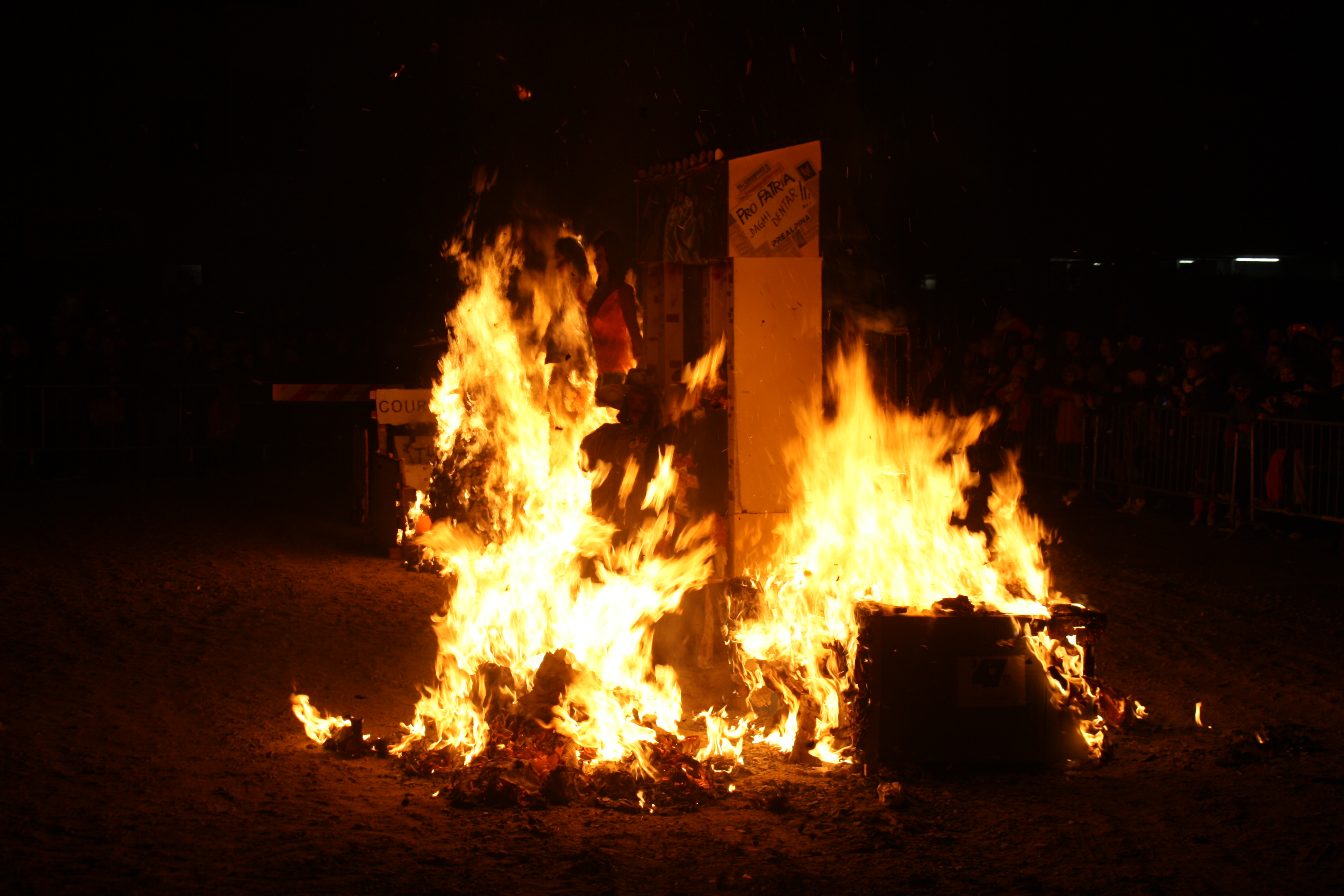 Il falò della giöbia del 29 gennaio 2015 a Busto Arsizio.